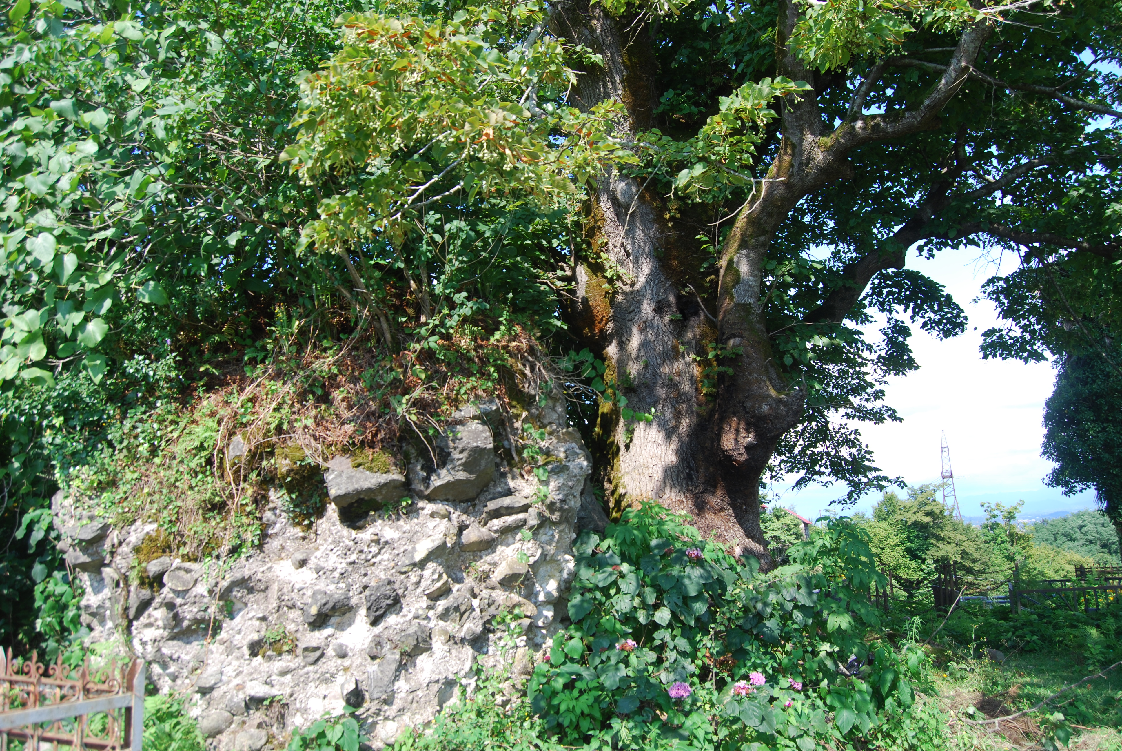 ნაკაშიძის ციხის ნანგრევები სოფ. ციხისფერდი (ციხე)